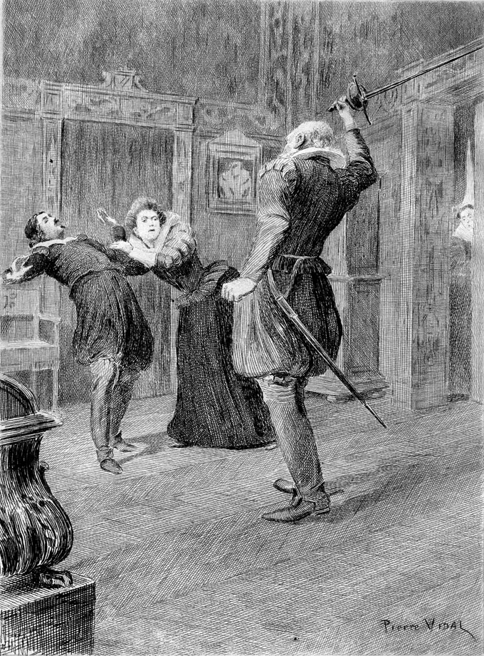 Title page of Honoré de Balzac's Gambara (1837).